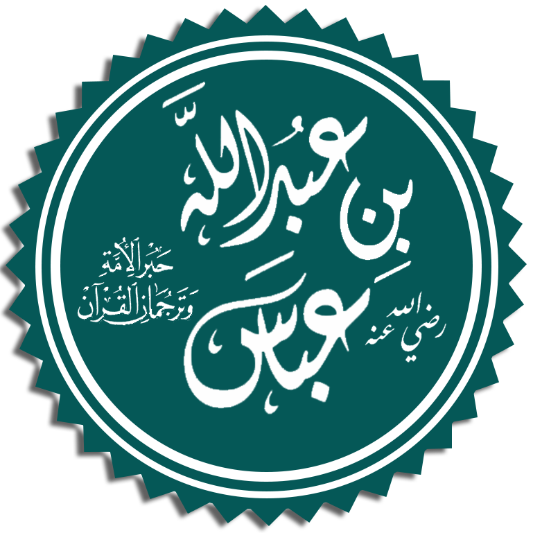 تخطيط اسم الصحابي عبد الله بن عباس حبر الأمة وترجمان القرآن